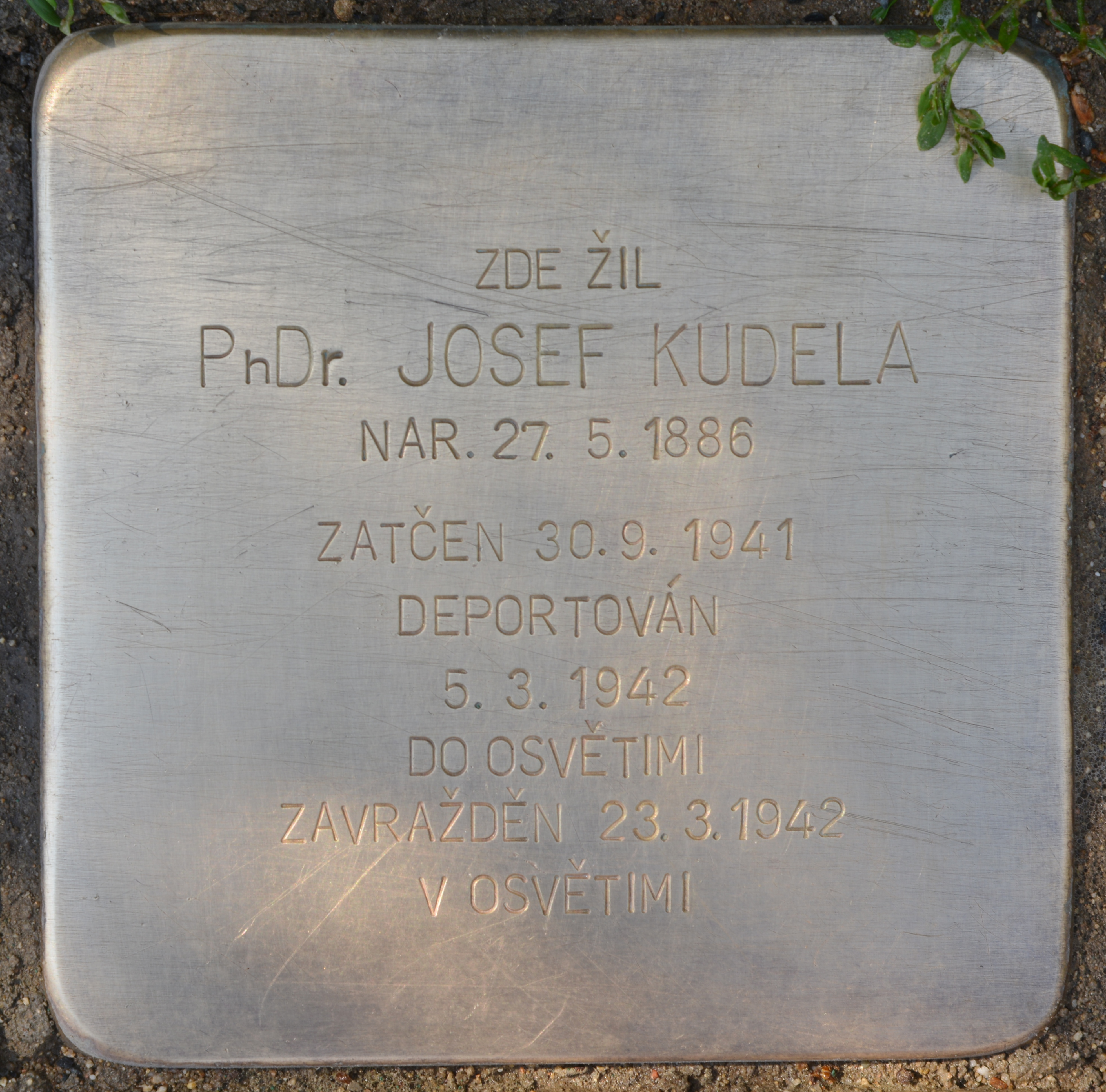 Gedenkstein für Josef Kudela